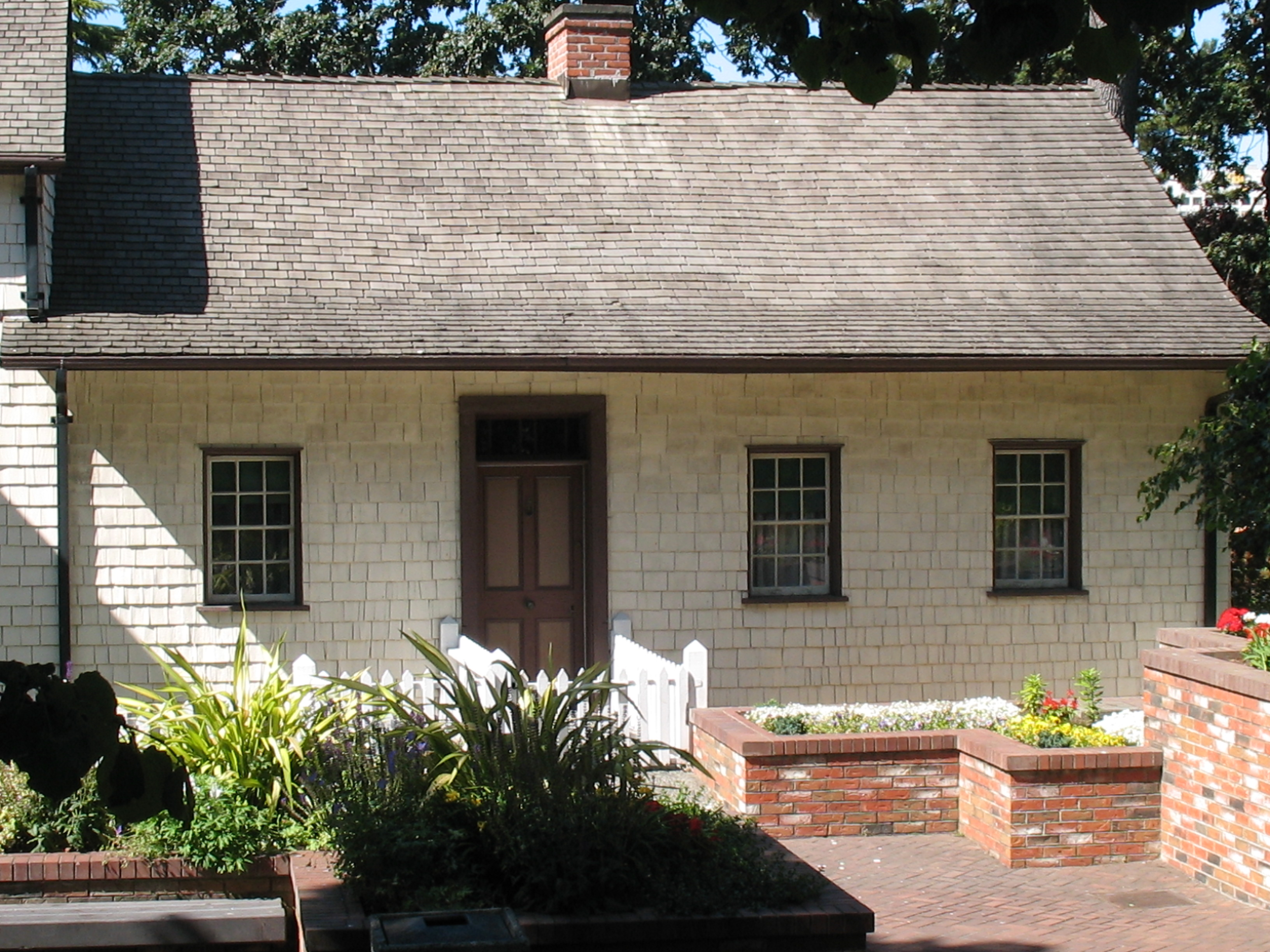 Ältester Teil des Helmcken-Hauses in Victoria, British Columbia (Kanada)